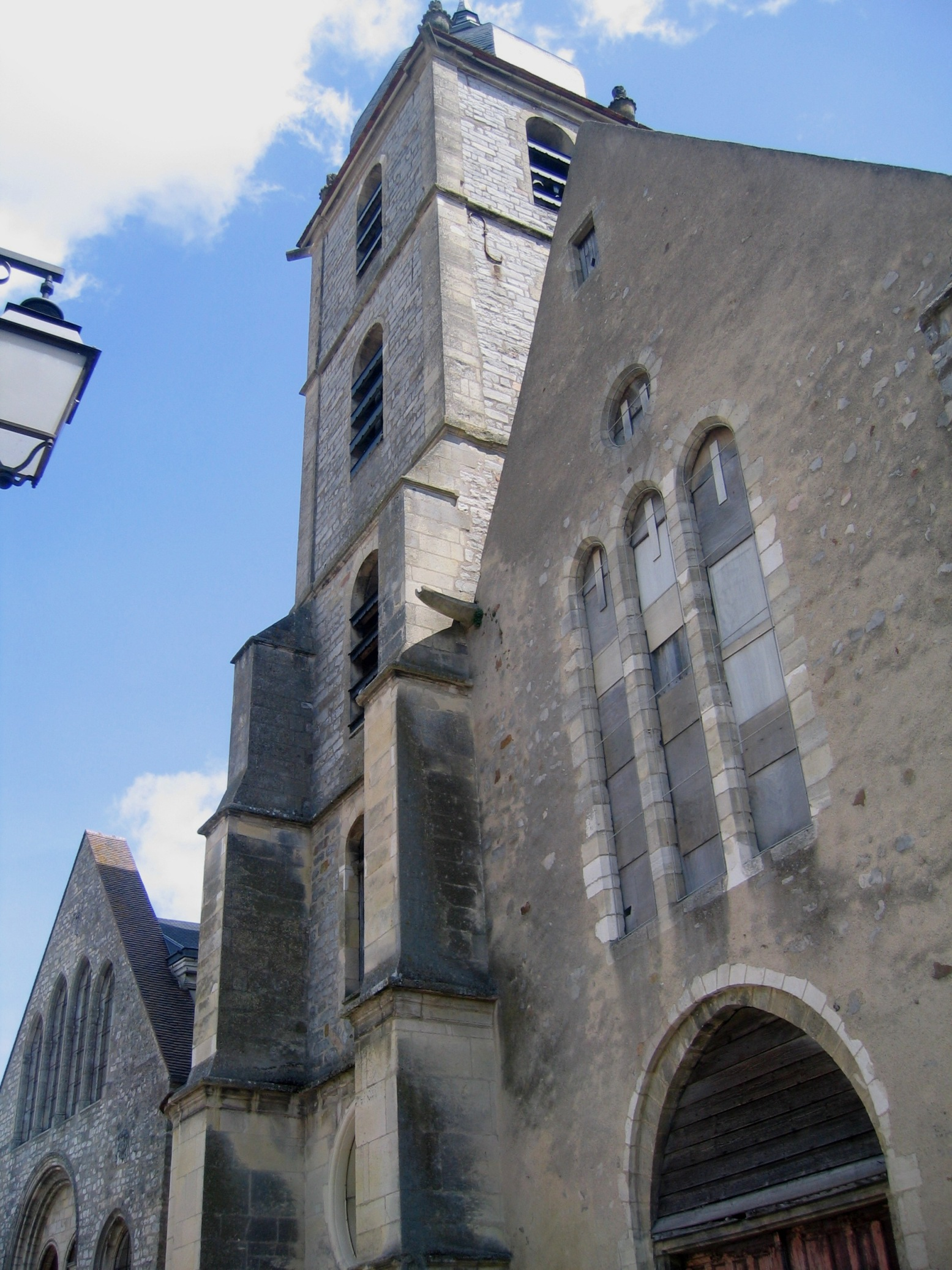 Yonne Sens Saint-Pierre-le-Rond 07062010